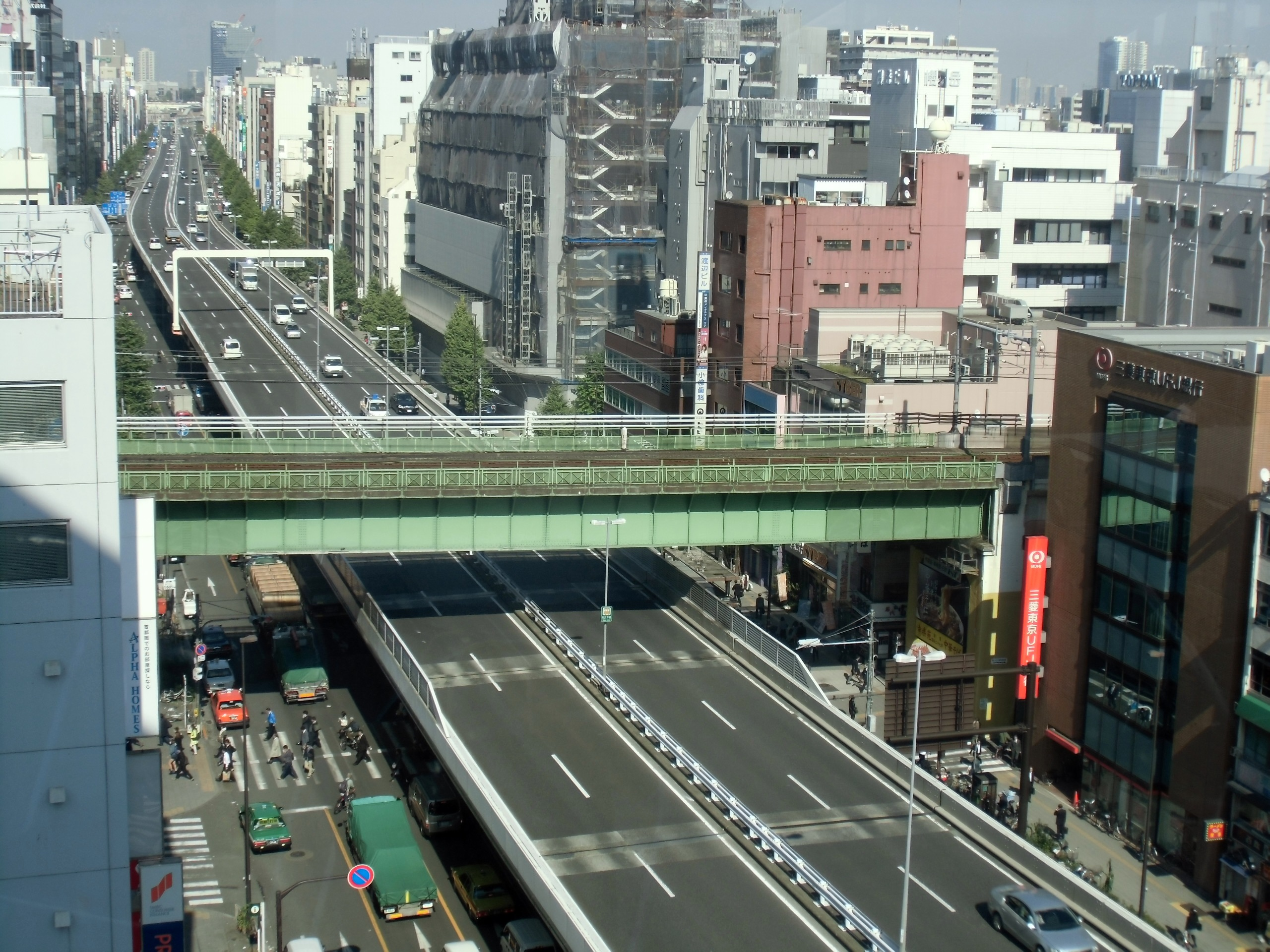 上空から見た昭和橋架道橋